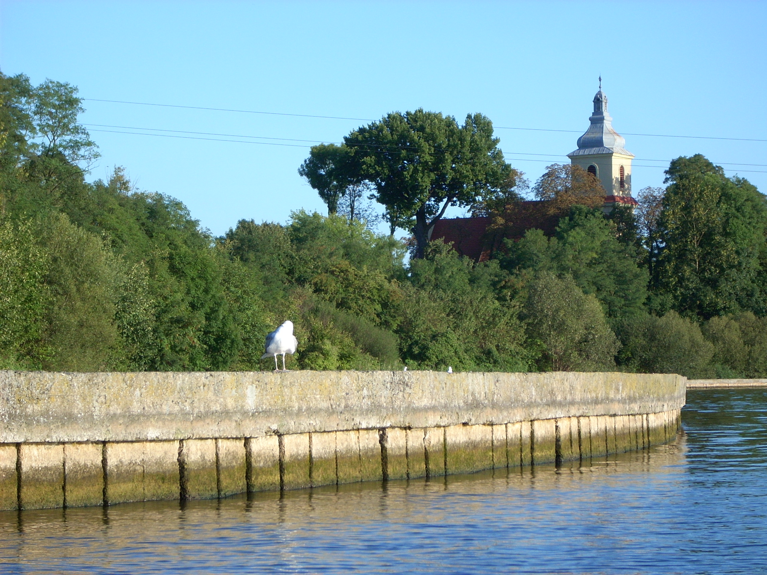 Widok na kościół pw. Wszystkich Świętych w Wąsoszach od strony Jeziora Mikorzyńskiego